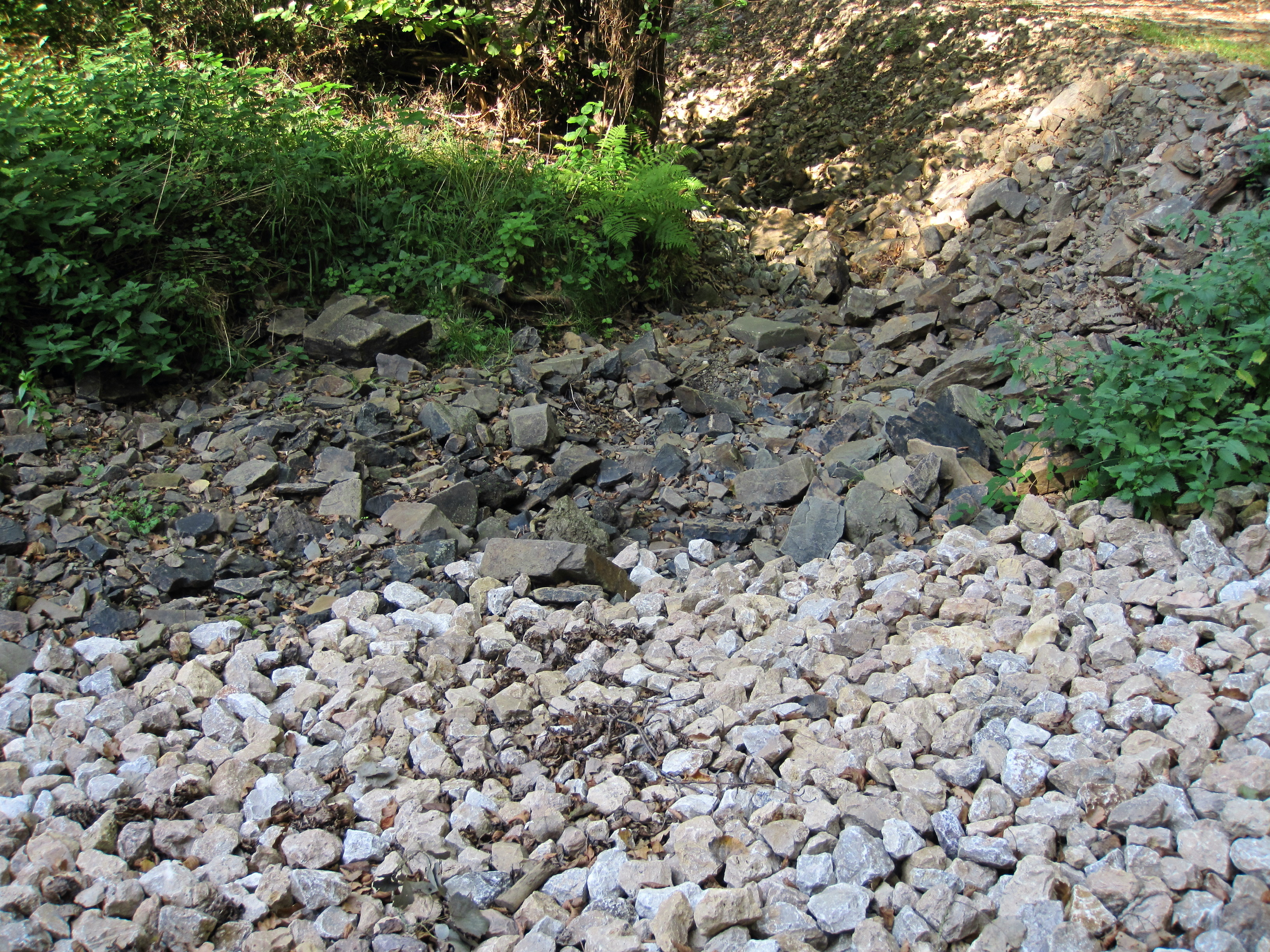 Die Furt des Wenigbachs